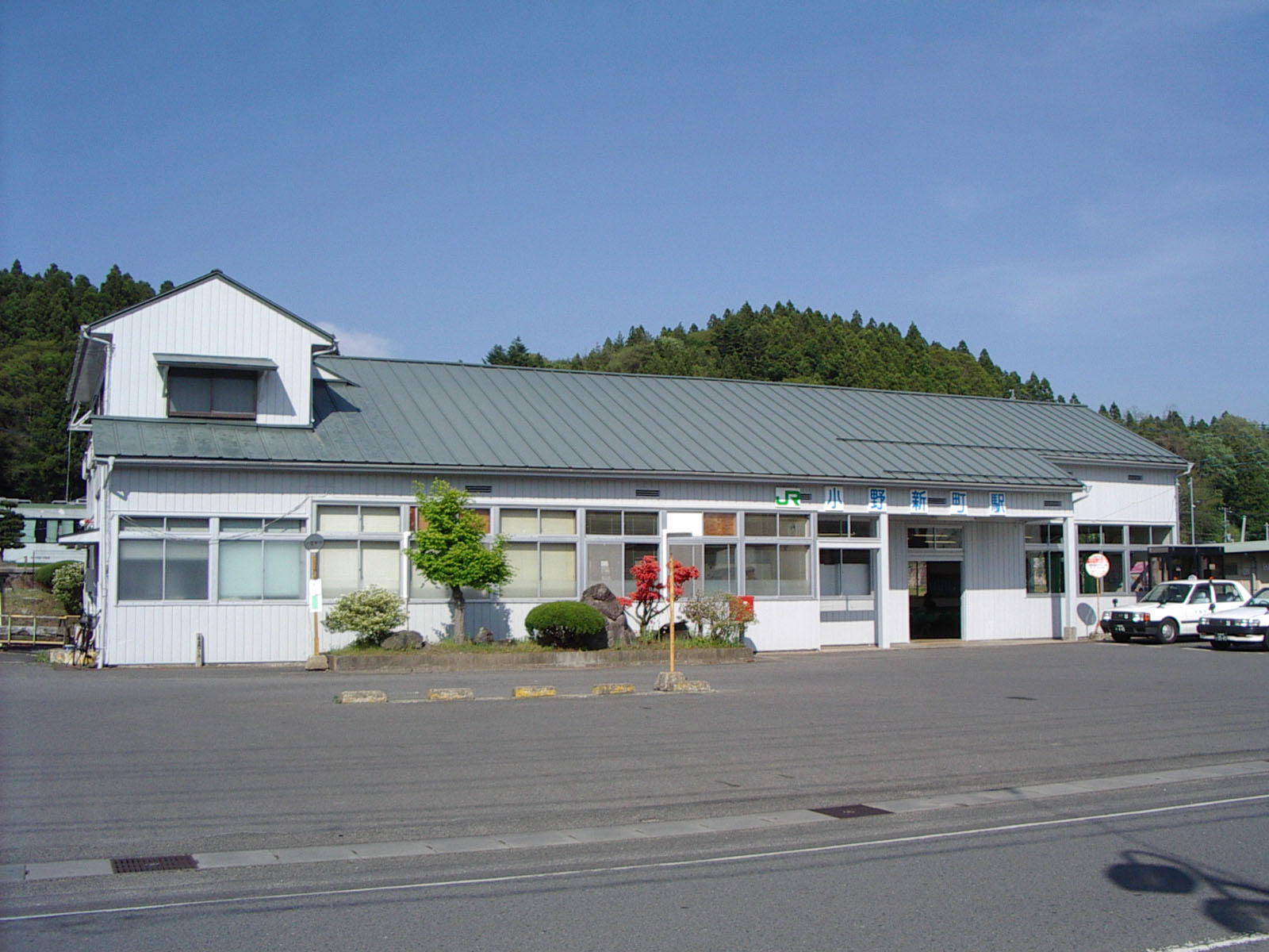 JR磐越東線小野新町駅 Ono-Niimachi Station,Fukushima on JR Banetsutou Line